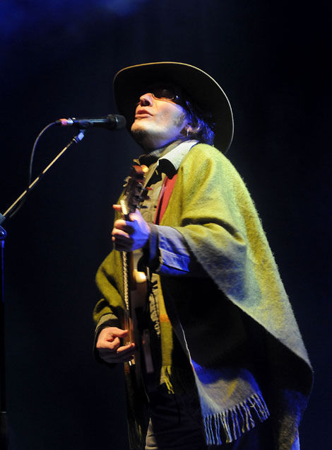 URUGUAY/ LAVALLEJA/ MINAS/ Fogones en el cerro Artigas, en el marco de 40 Semana de Lavalleja, tradicional festejo departamental que este año se celebra conjuntamente con el festejo de Las Vigilias del Bicentenario, un conjunto de festejos en cada una de las capitales departamentales que evocará el inicio del "Éxodo del Pueblo Oriental" hace dos siglos. En el escenario principal actuaron: Los baguales, Solipalma, Julio Víctor Gonzalez, Los Nocheros, Carlos Paravis que interpretó A Don José, y cerró la jornada Jorge Nasser. 22-10-2011 foto: Fernando Morán